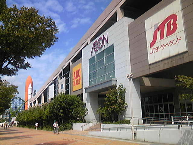 イオンモール八幡東 店舗外観（いのちのたび博物館側・北九州市八幡東区）